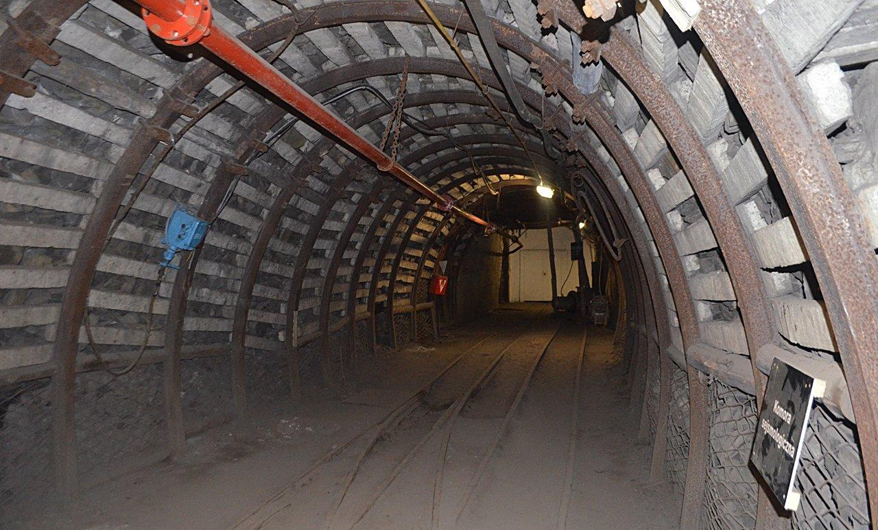 Chodnik na poziomie 320